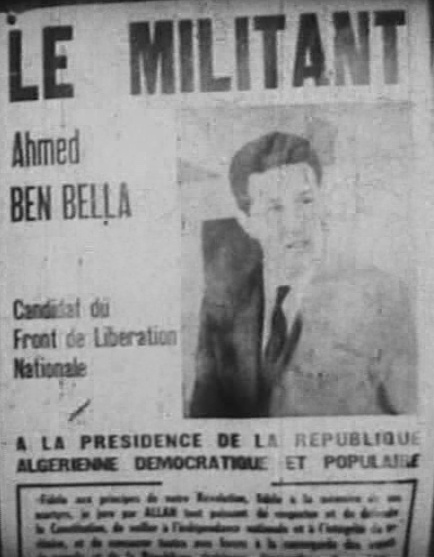 Affiche de publicité électorale 1963. إعلان لترشح بن بلة كرئيس للجزائر